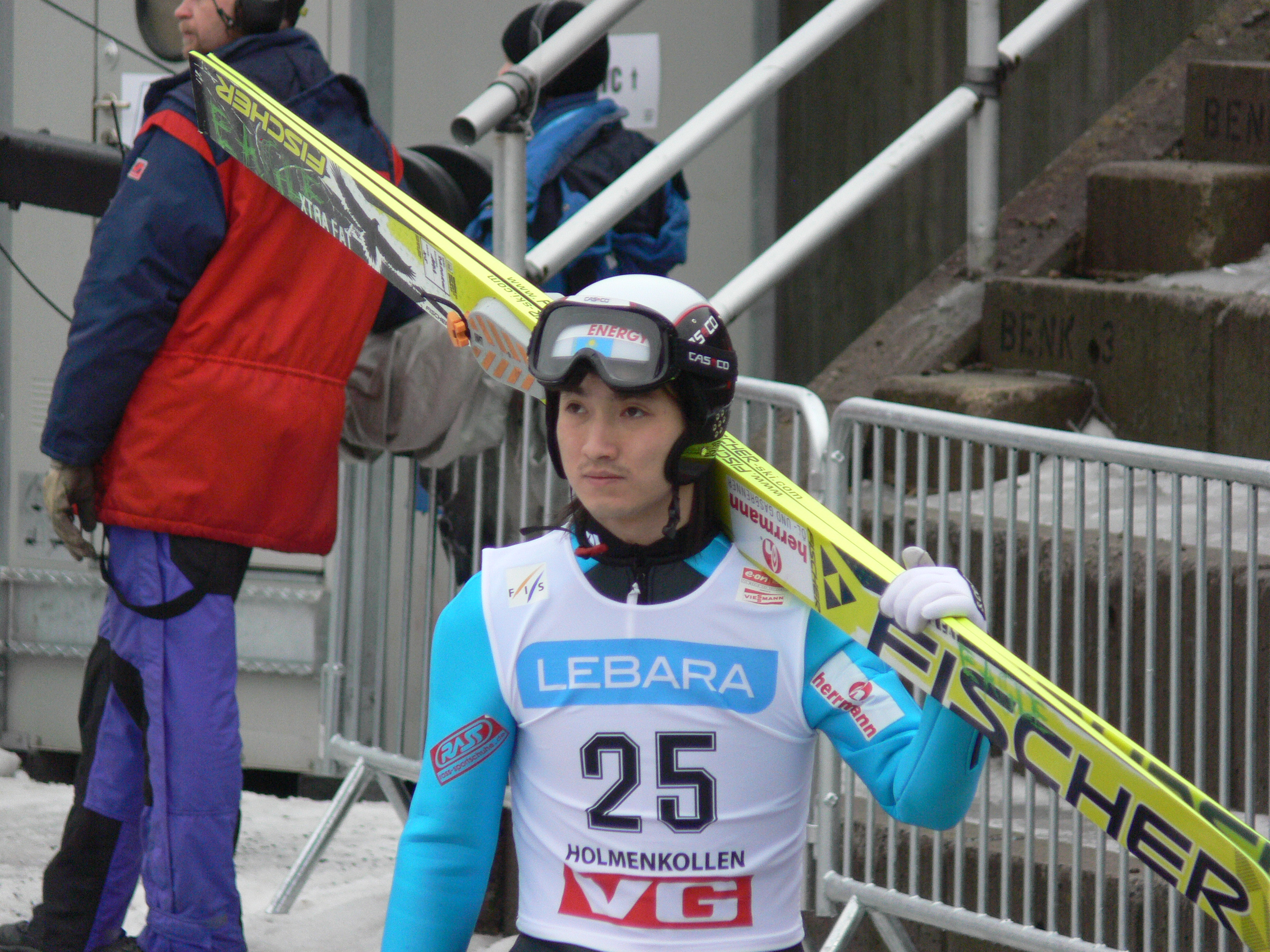 Radik Zhaparov, from the 2008 ski jumping World Cup event in Holmenkollen.